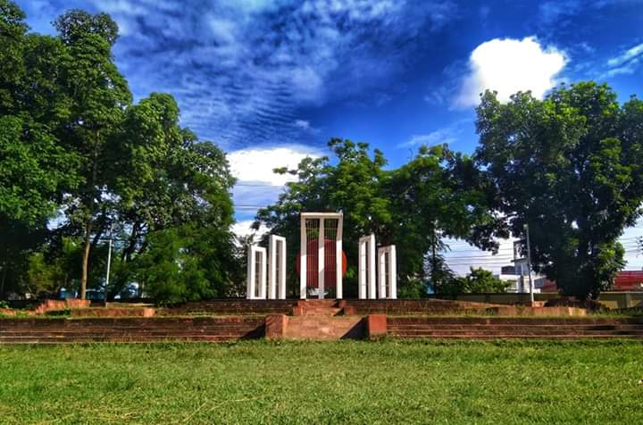 RUET Shaheed minar